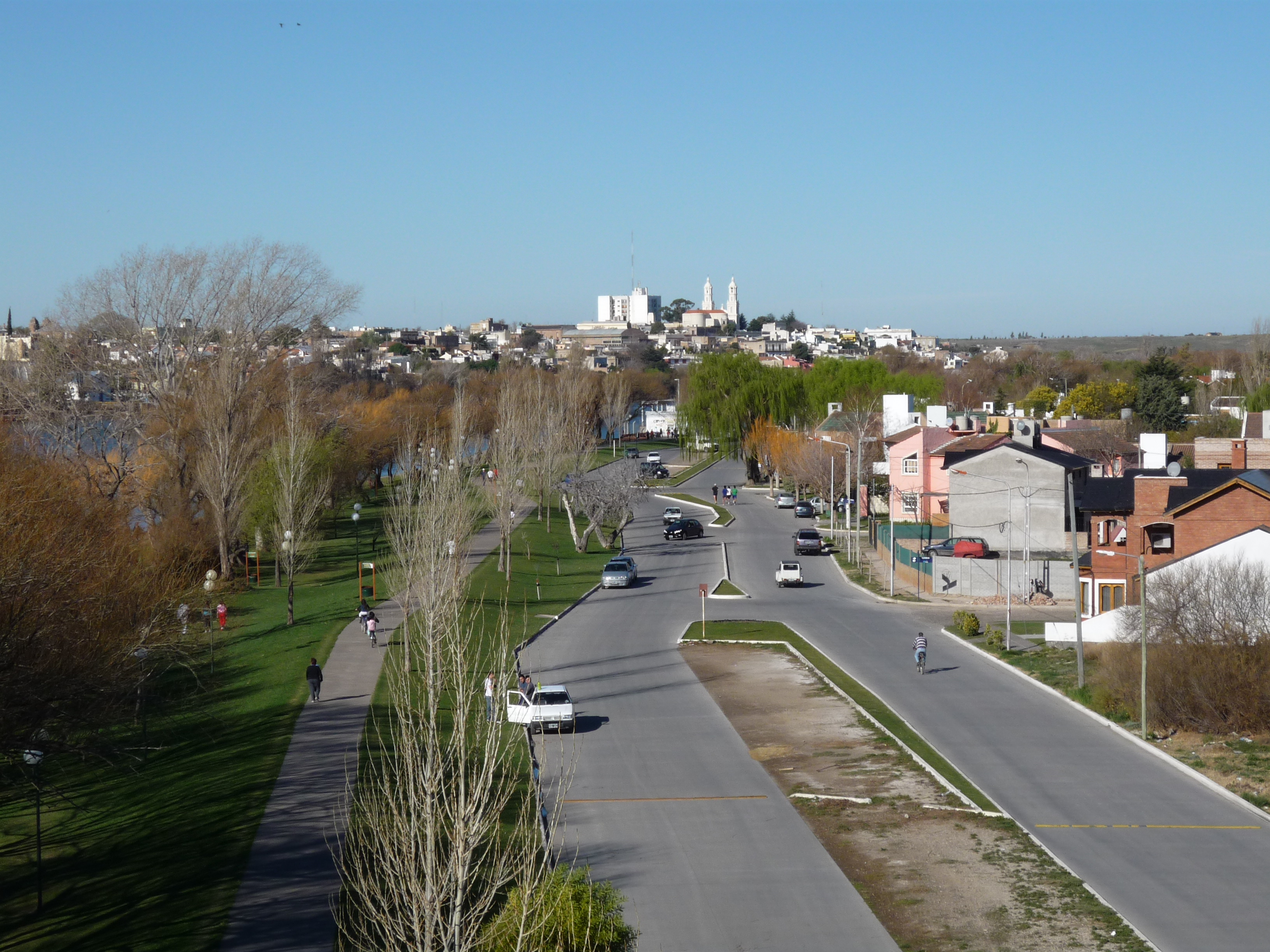 Av. Francisco de Viedma. Viedma, Argentina.